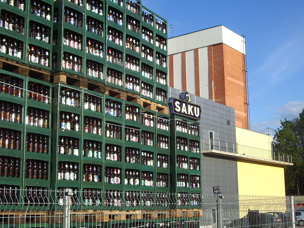 saku õlletehase juurdeehitus ;)